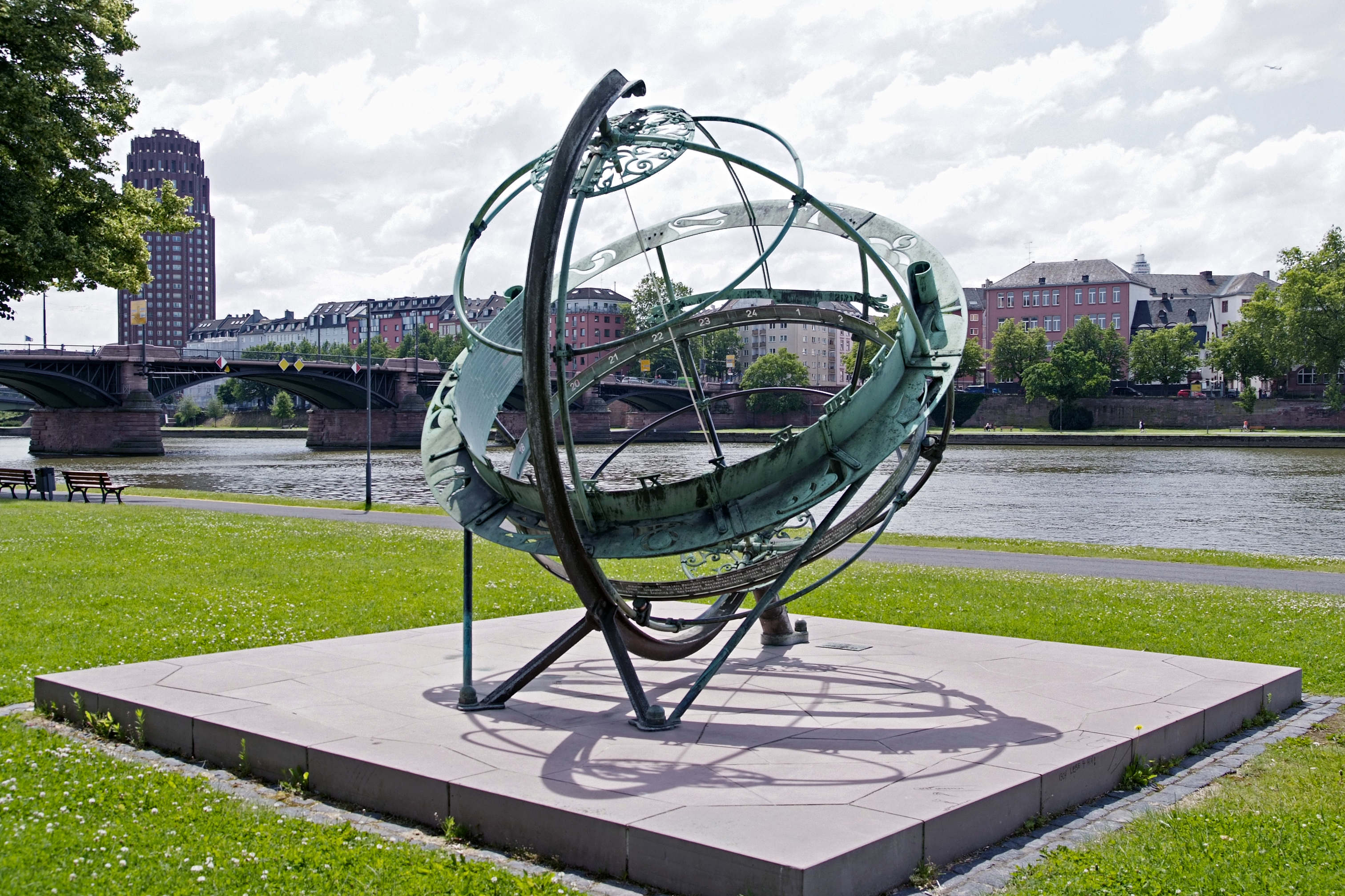 Äquatorialsonnenuhr in Frankfurt am MainBlick non Nord-West; Äquatorring mit den 12 Tierkreiszeichen